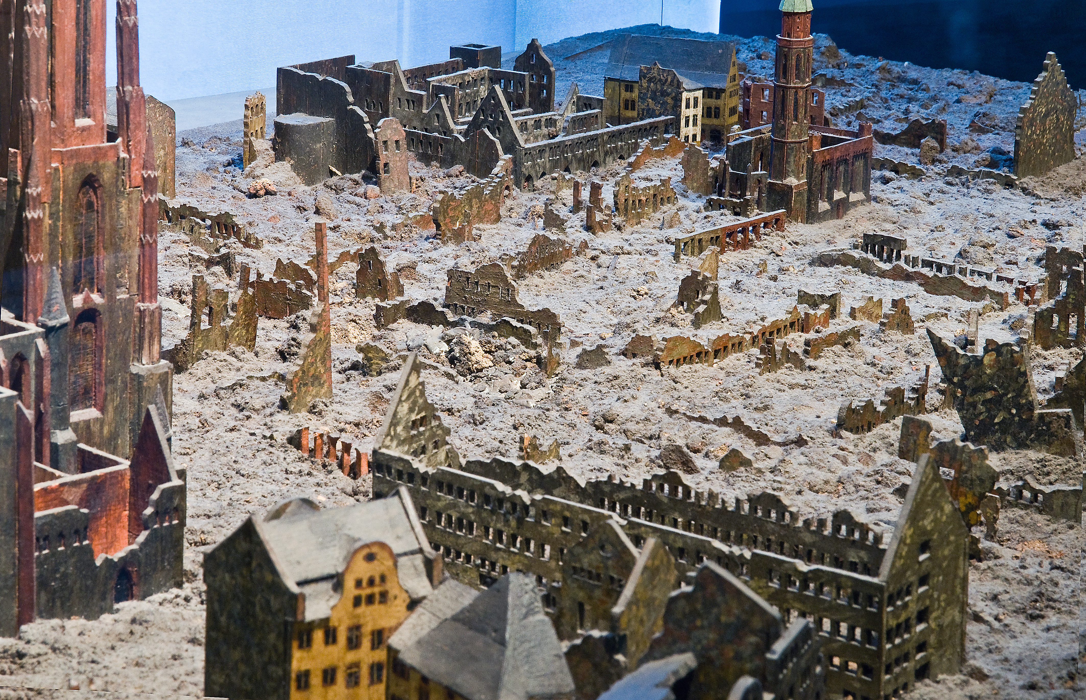 Historisches Museum Frankfurt am Main Modell der Frankfurter Altstadt nach den Zerstörungen des 2. Weltkriegs